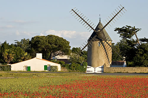 Le Moulin de Bellerre au Morinand - Le Bois-Plage-en-Ré - Île de Ré - Charente-Maritime Photo issue de ma banque d'images : Alain - Pep.per 24 septembre 2006 à 16:01 (CEST)